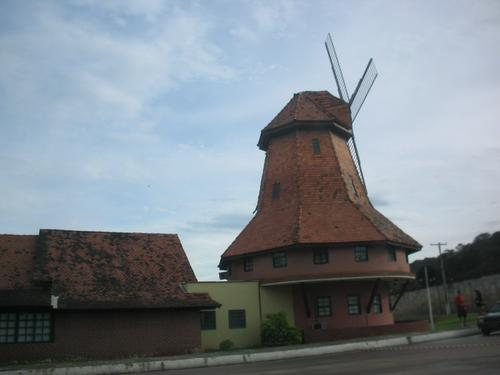 Joinville city, Santa Catarina, Brazil